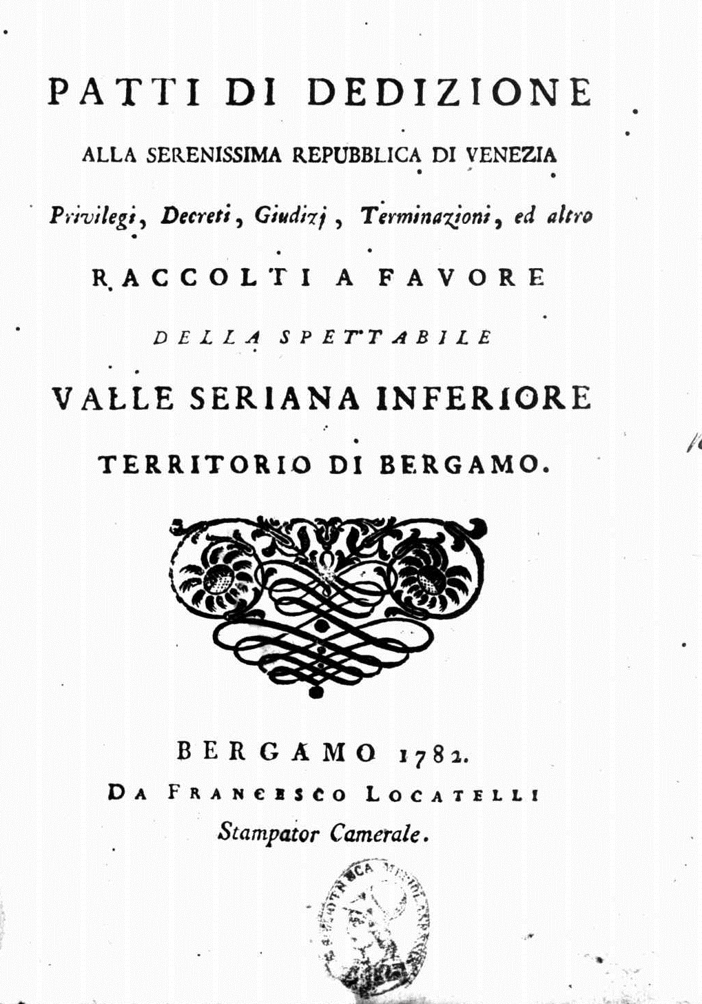 Frontespizio